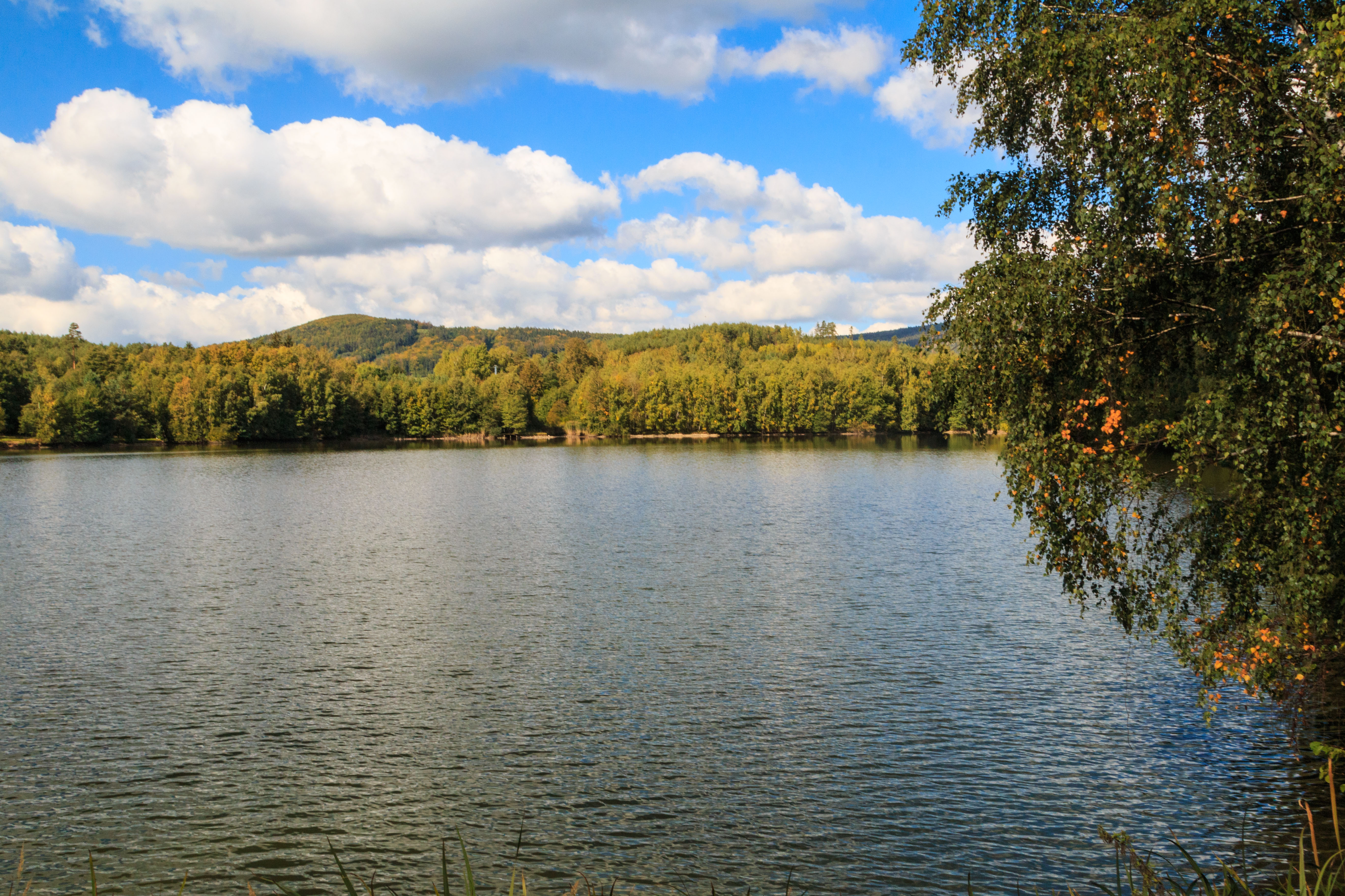 Horní Kunratický rybník Project: Vodstvo.